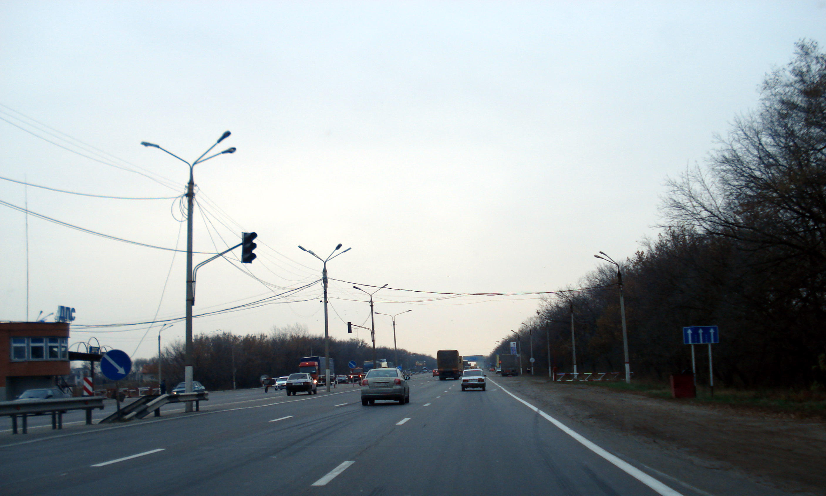 Автодорога М4 на выезде из Воронежа с юго-востока